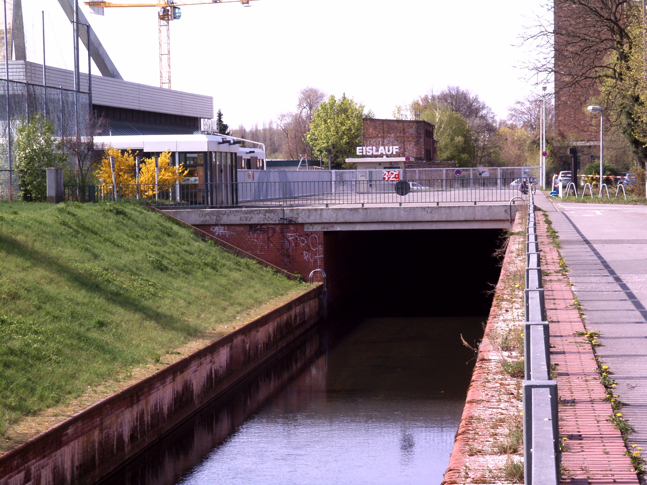 Brücken über die Panke, der sogenannte Pankedeckel am Interlauf des Pankegrabens zum Nordhafen, er dient als Parkplatz und Zugang zum Erika-Hess-Eisstadtion